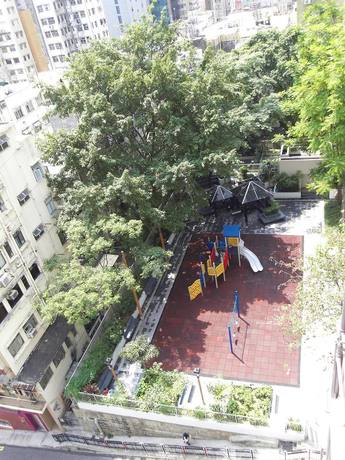 中文（香港）: 光漢台公園, 鴨巴甸街, 我香港